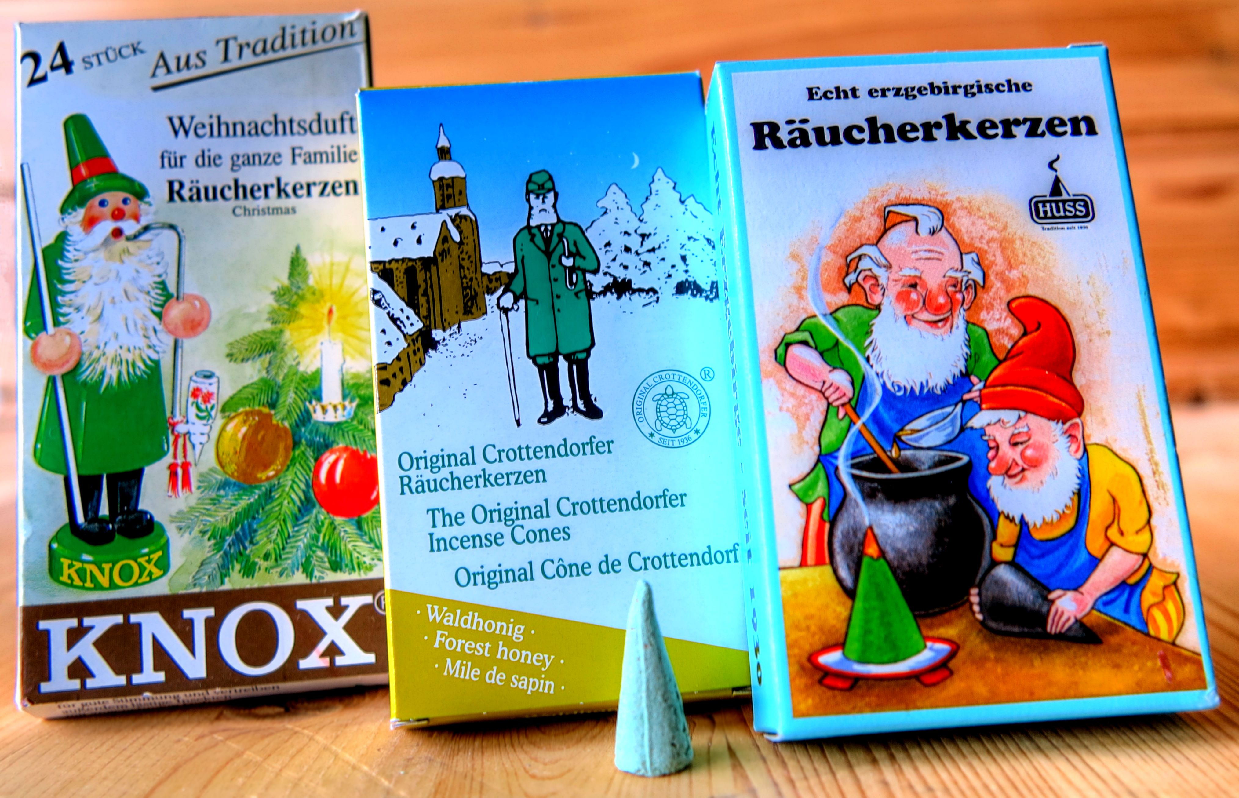 Räucherkerzenpackungen der sächsischen Hersteller aus dem Erzgebirge; KNOX (Duft:Christmas), Crottendorfer (Duft: Waldhonig) und HUSS (Lavendel)